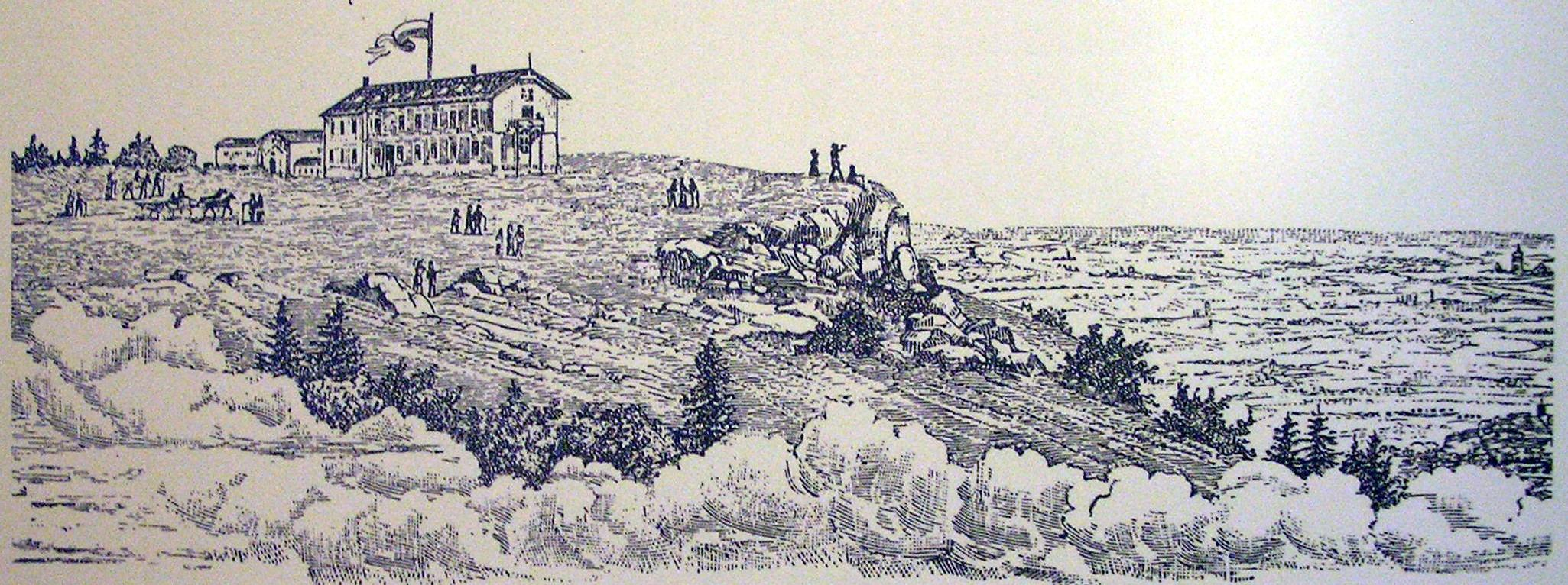 Litographie des Großen Feldbergs, Hessen, Deutschland, um 1868